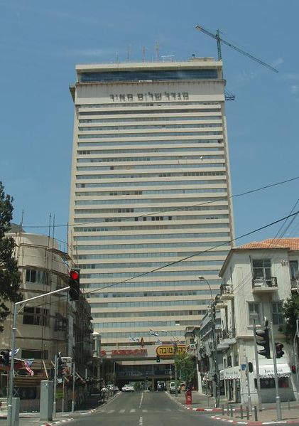 מגדל שלום, 2005. צילם דוד שי